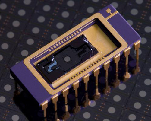 Beispiel für einen 2D-Mikroscanner vom Fraunhofer IPMS. Zu sehenen ist ein elektrostatischer 2D-Mikroscanner mit einer quasistatisch betriebenen Antriebsachse von bis zu ±8° statischer Auslenkung @ 120 V und einer resonant angetriebenen Achse mit einer nominalen Amplitude von ±9,5° @ 23,5 kHz & 160 V in einem DIL20-Gehäuse